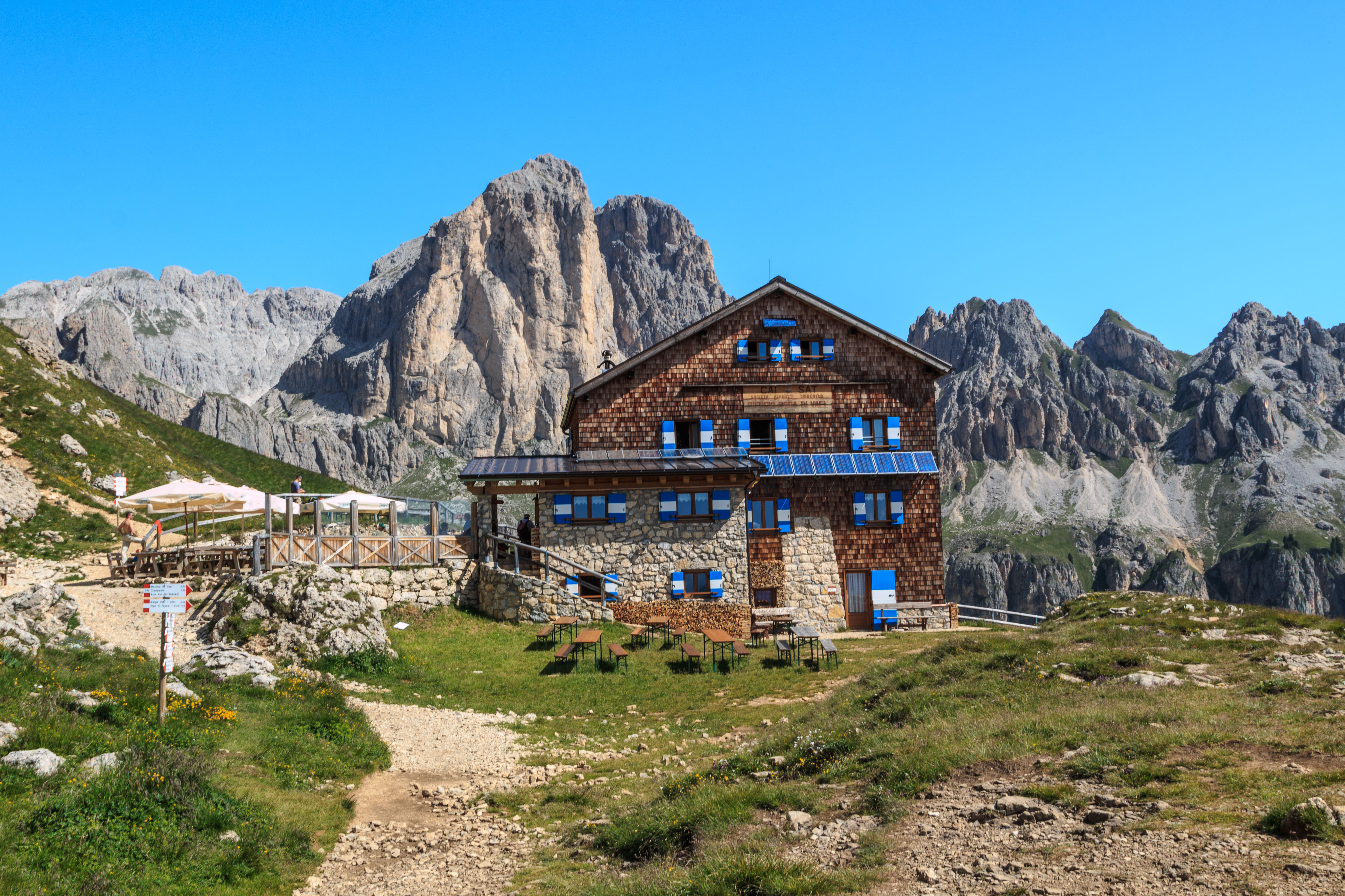 Rotwandhütte in July 2015